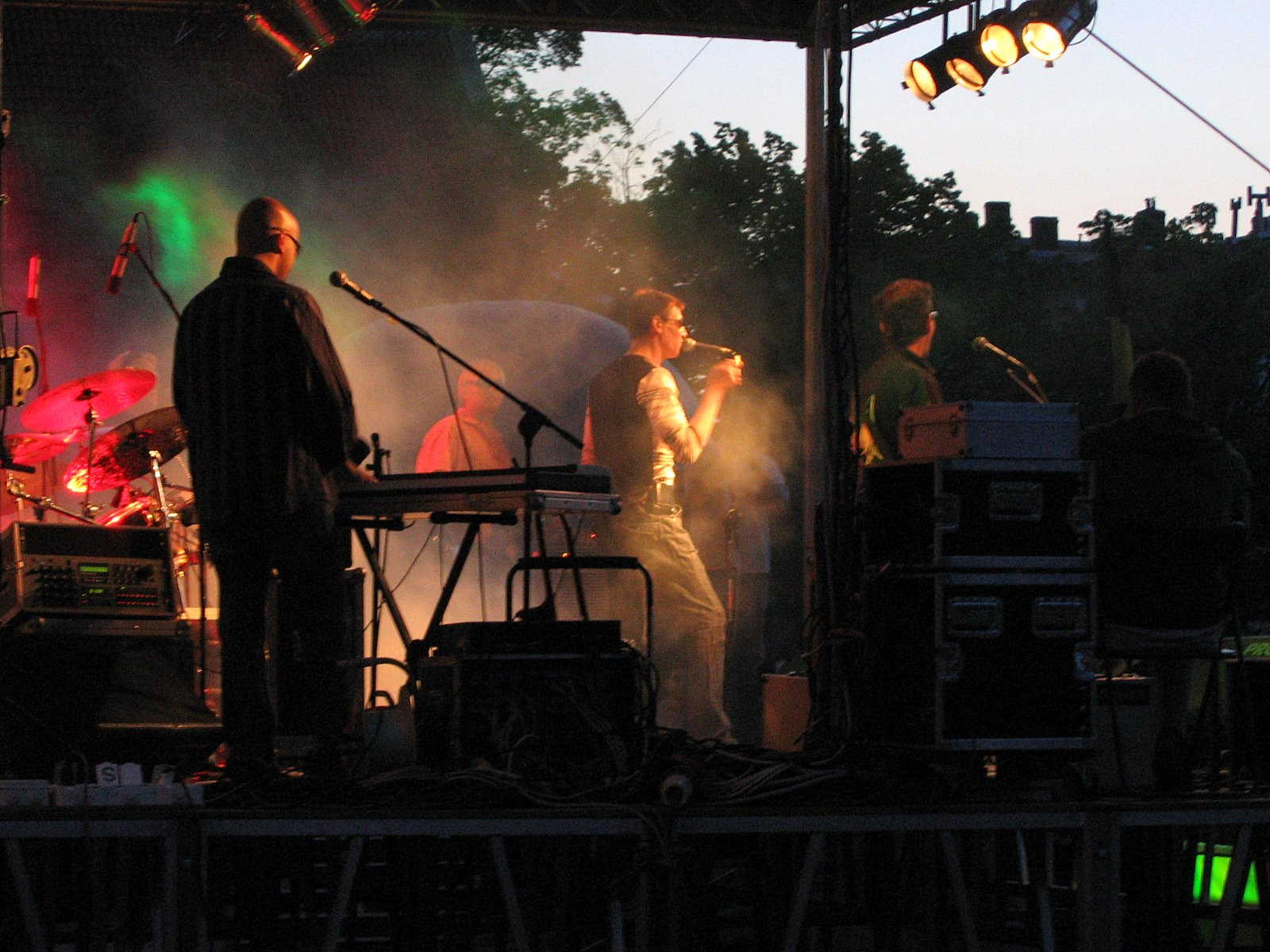 koncert w Wejherowie zespołu Püdelsi